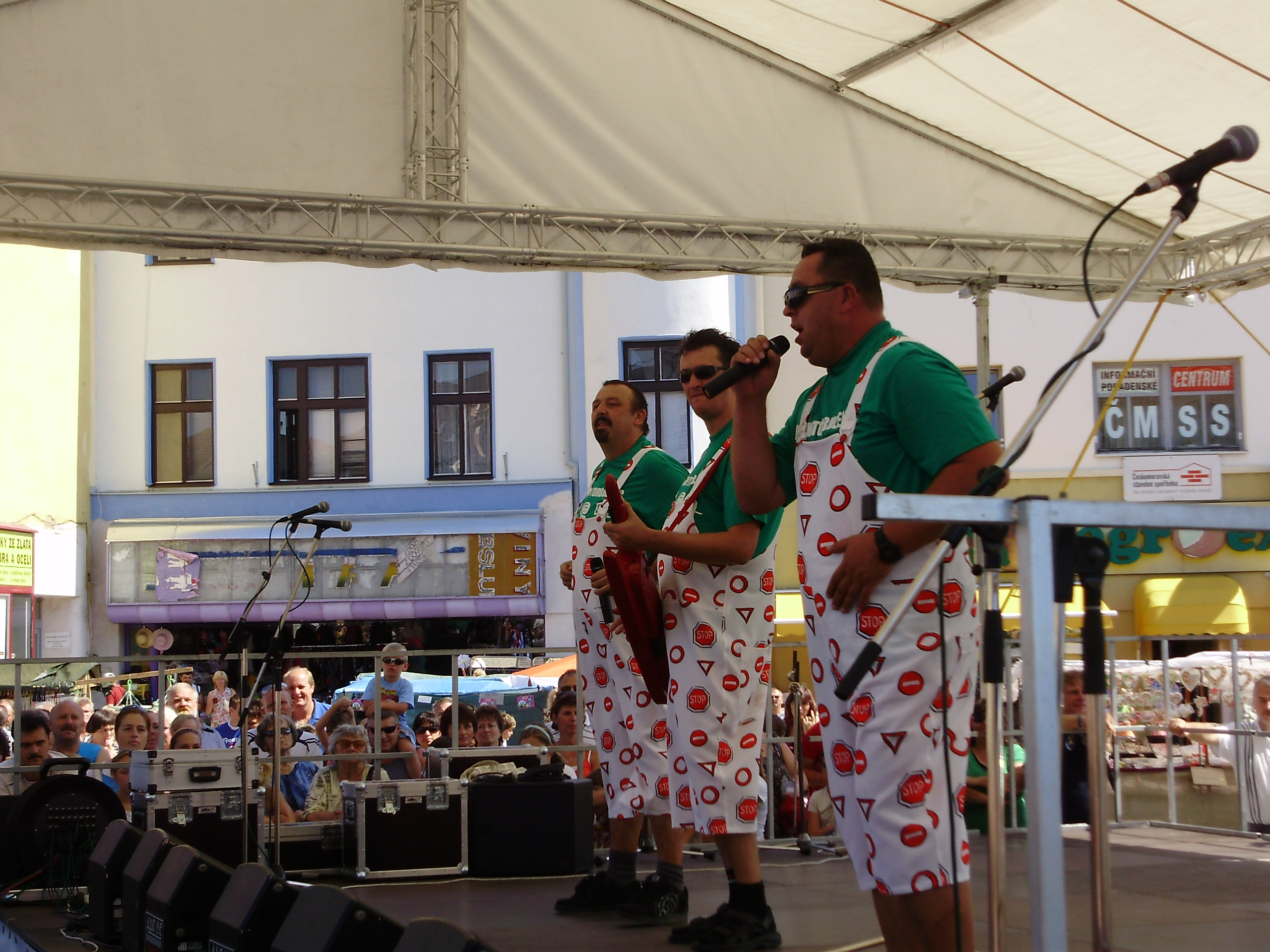 16. 8. 2009 Vyškovská pouť